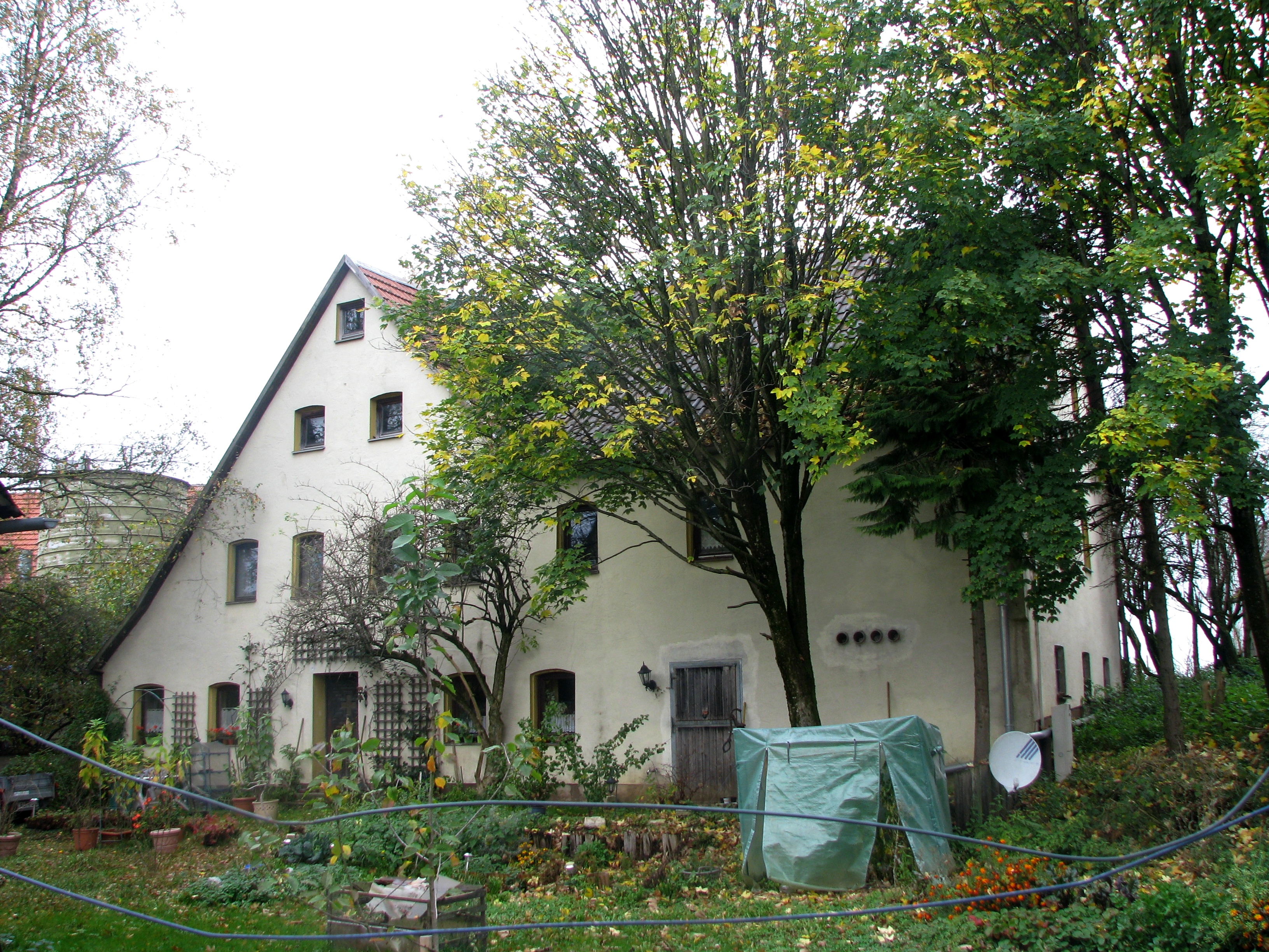 Bischberg, Ortsteil von Berg bei Neumarkt in der Oberpfalz, Malerisches Anwesen